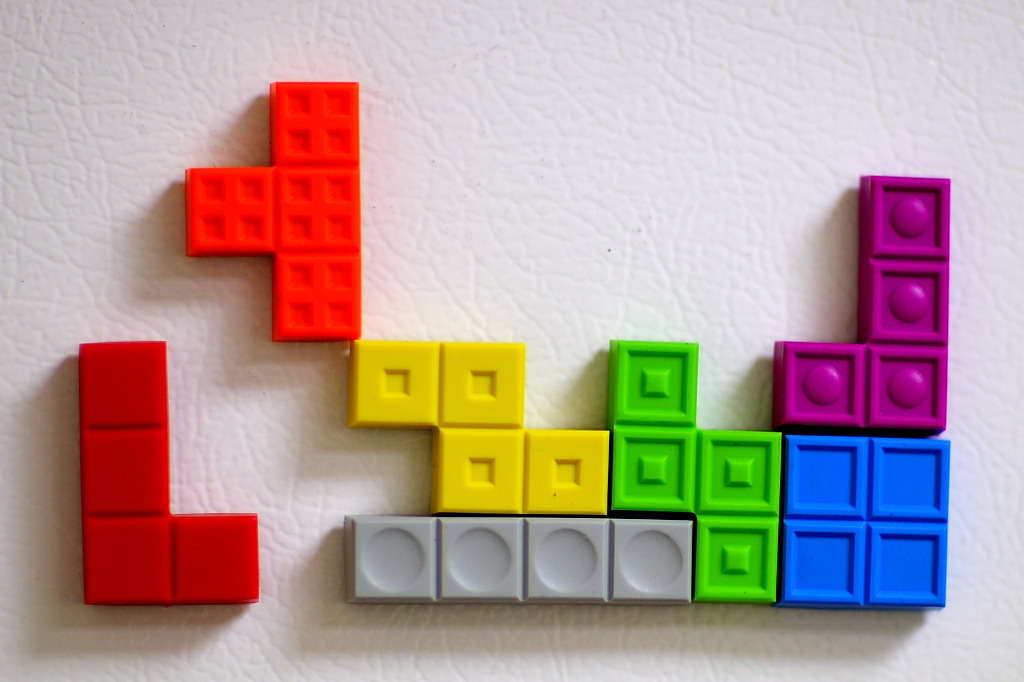 A nice double t-spin opener.